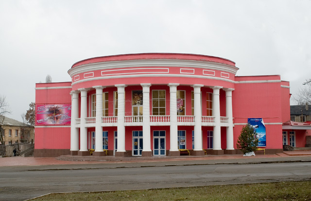 Кинотеатр "Мир"